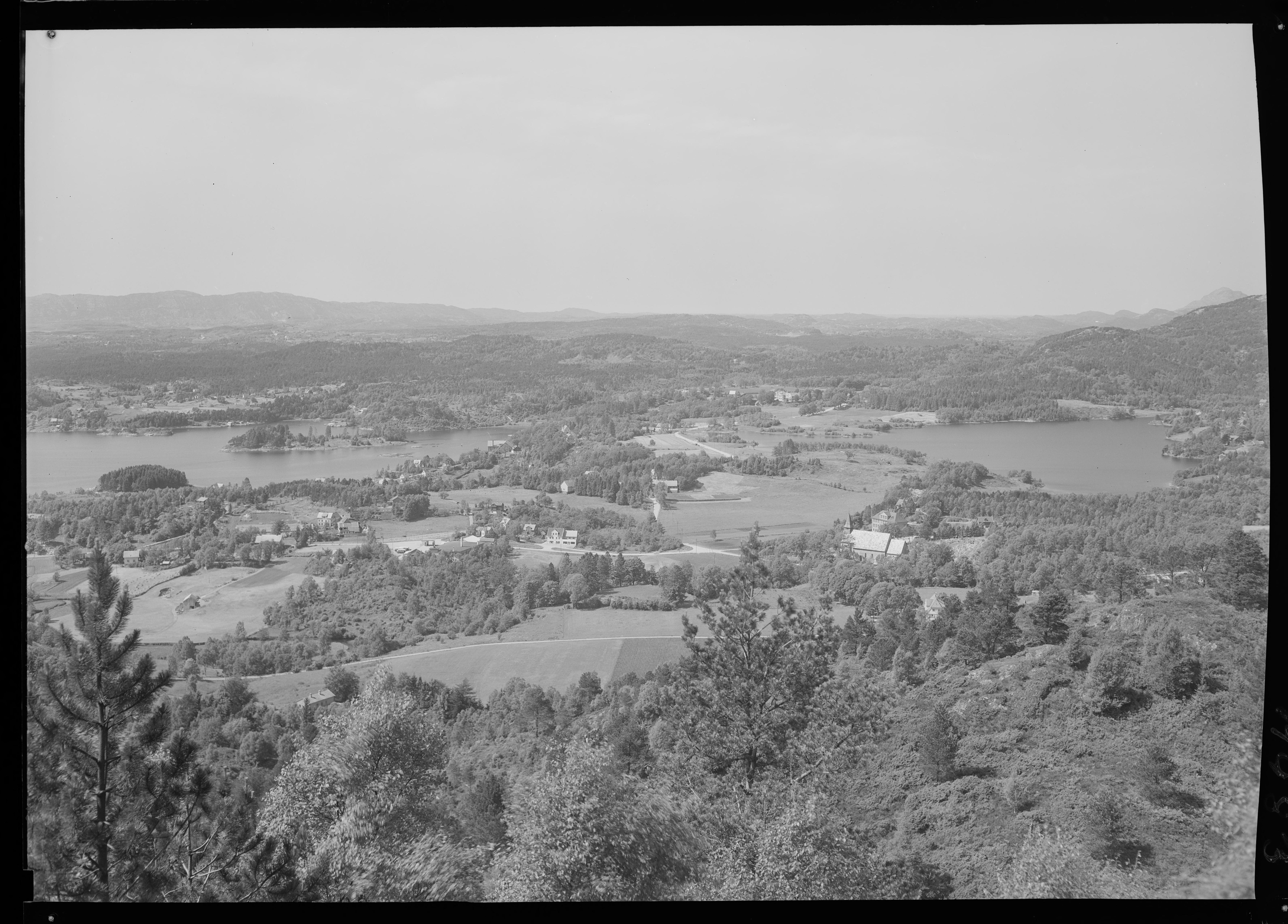 Bildet er hentet fra Nasjonalbibliotekets bildesamling. Anmerkninger til bildet var: Fotograf : ukjent Fana, Bergen, Hordaland